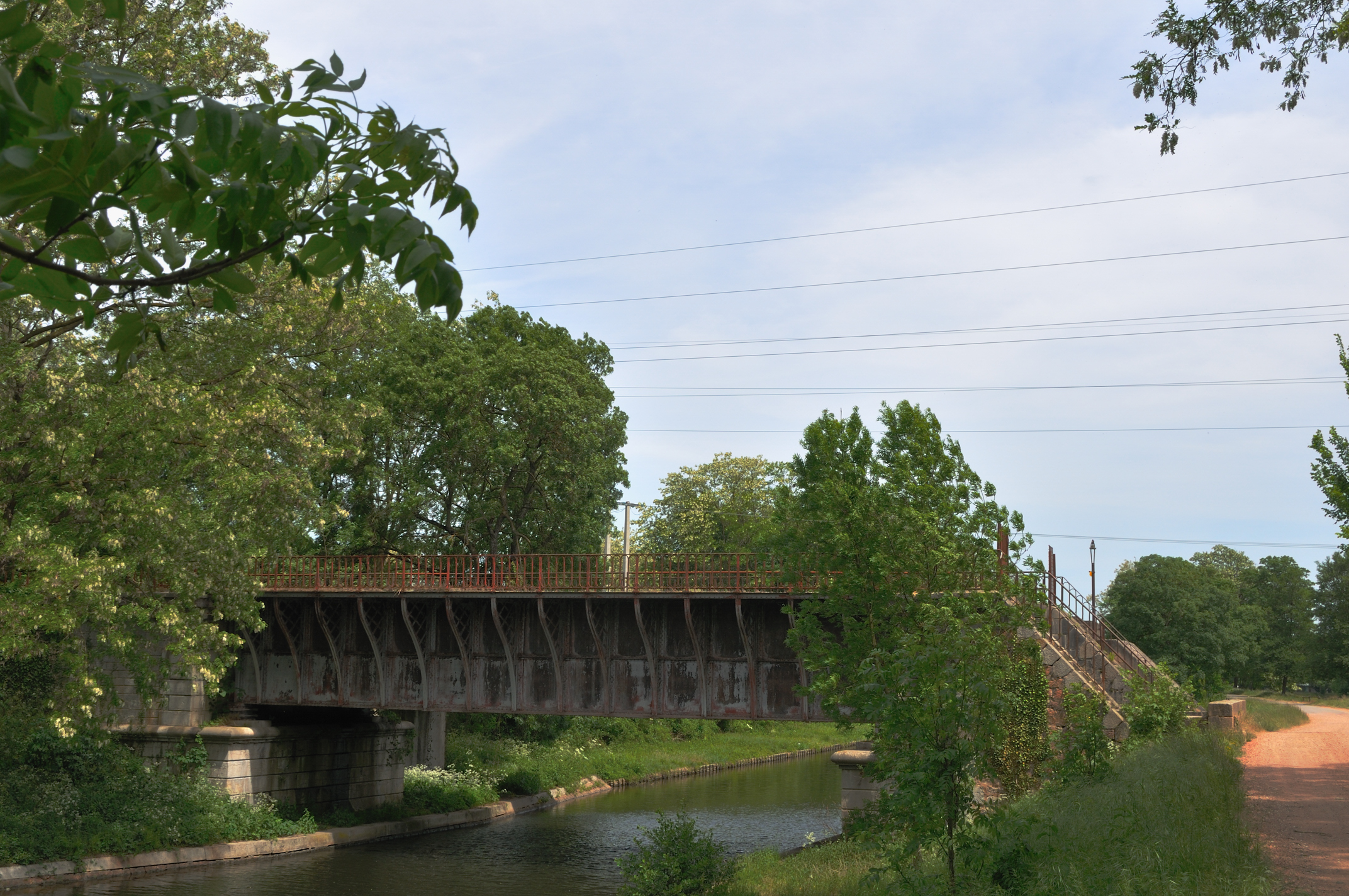 Pont-rivière de l'Oudan, Roanne, Loire, France